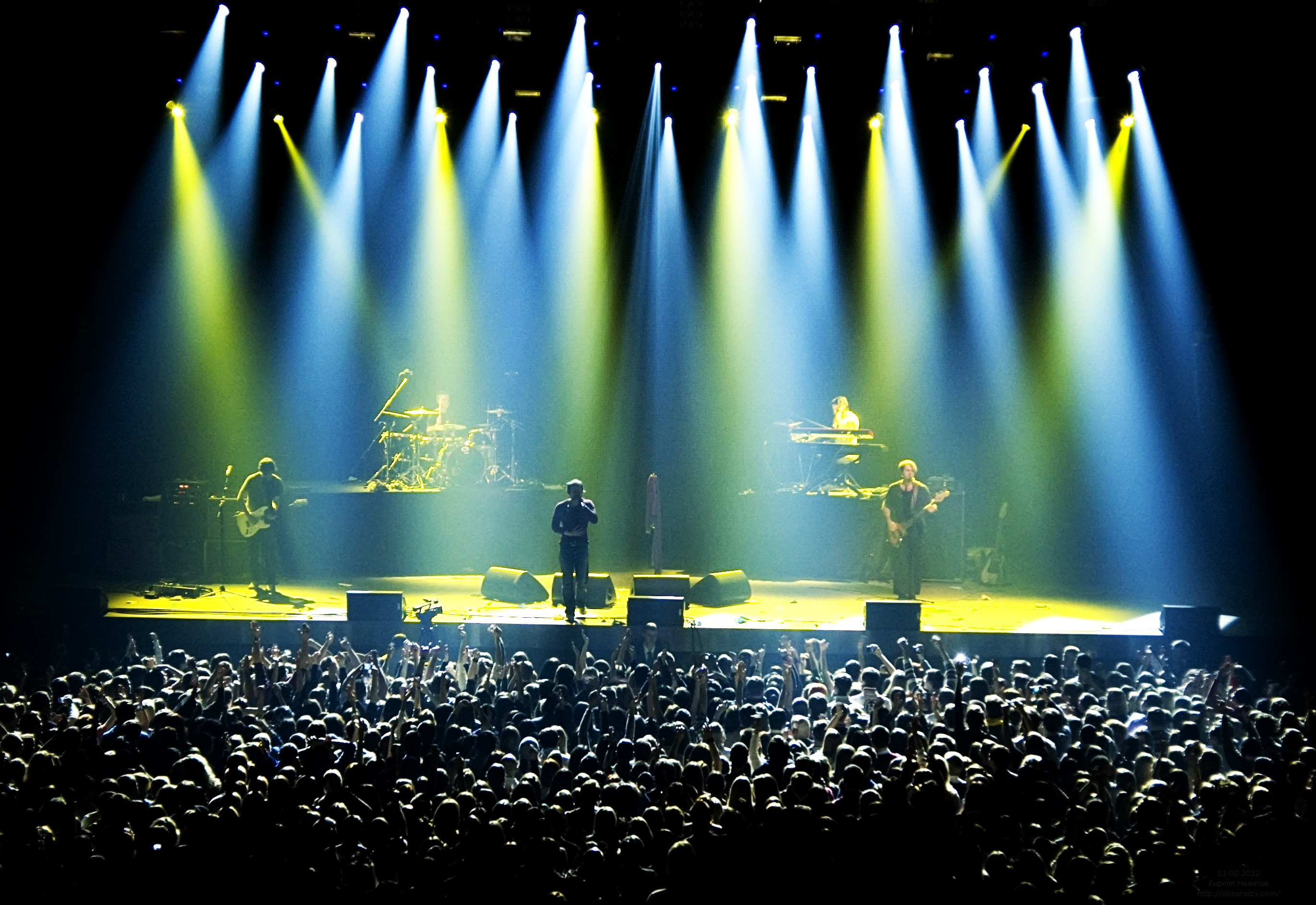 Концерт у Москві. 11 лютого 2012 року. Відкриття клюба "Stadium Live".